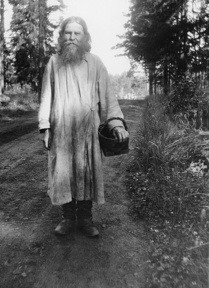 Монах Валаамского монастыря